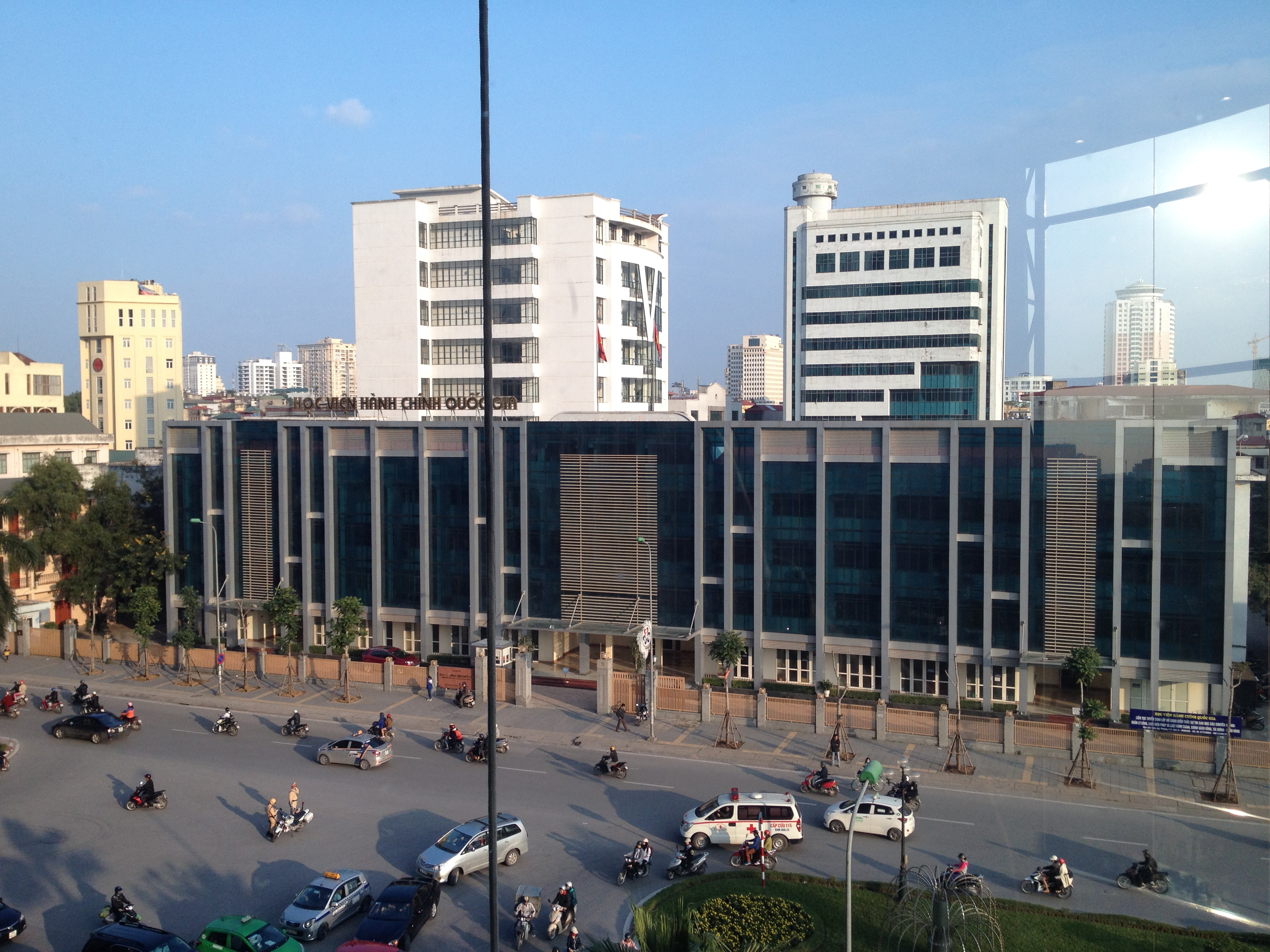 Hà Nội, Việt Nam.